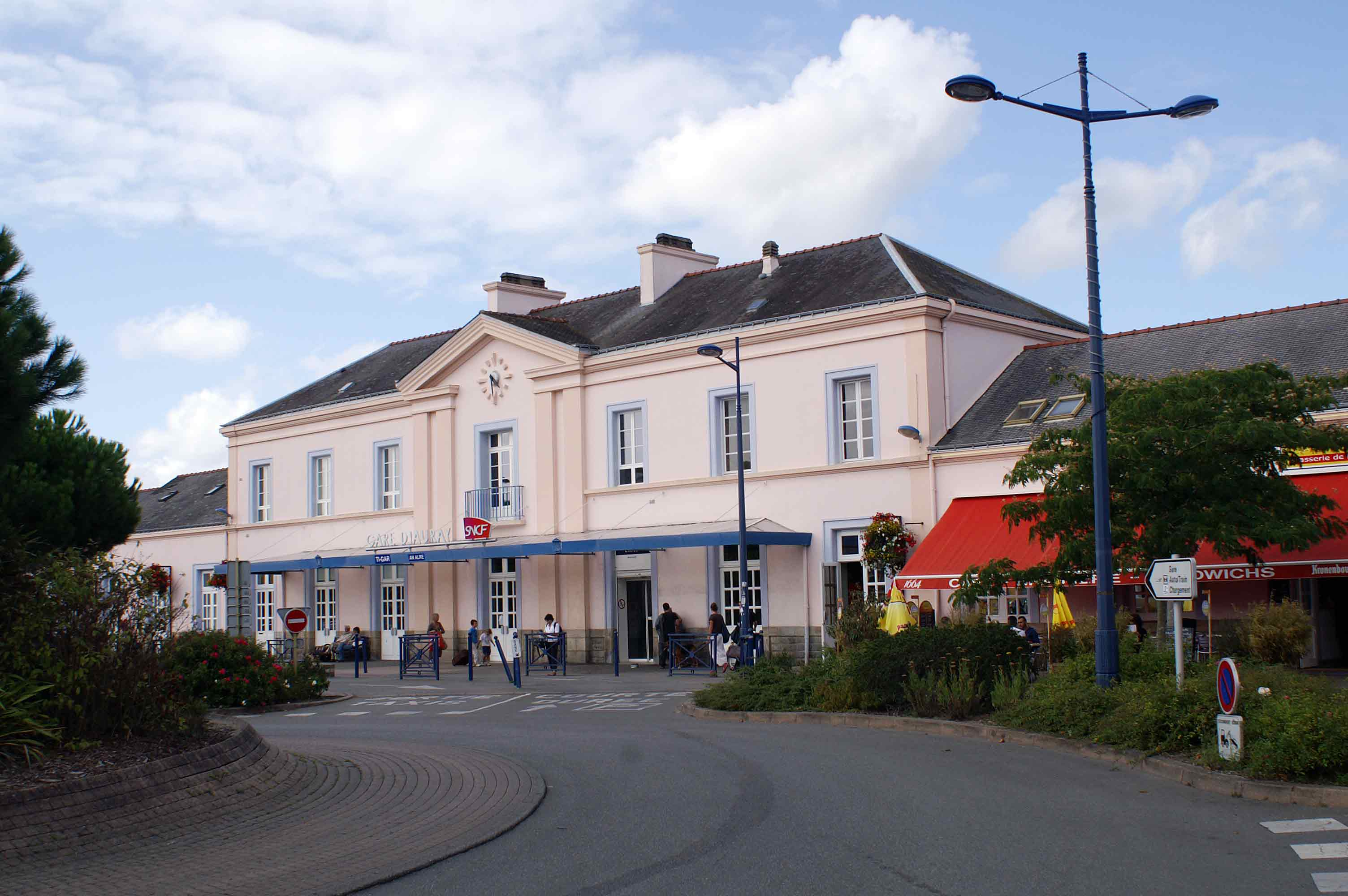 Gare d'Auray, bâtiment voyageur, la façade rue.